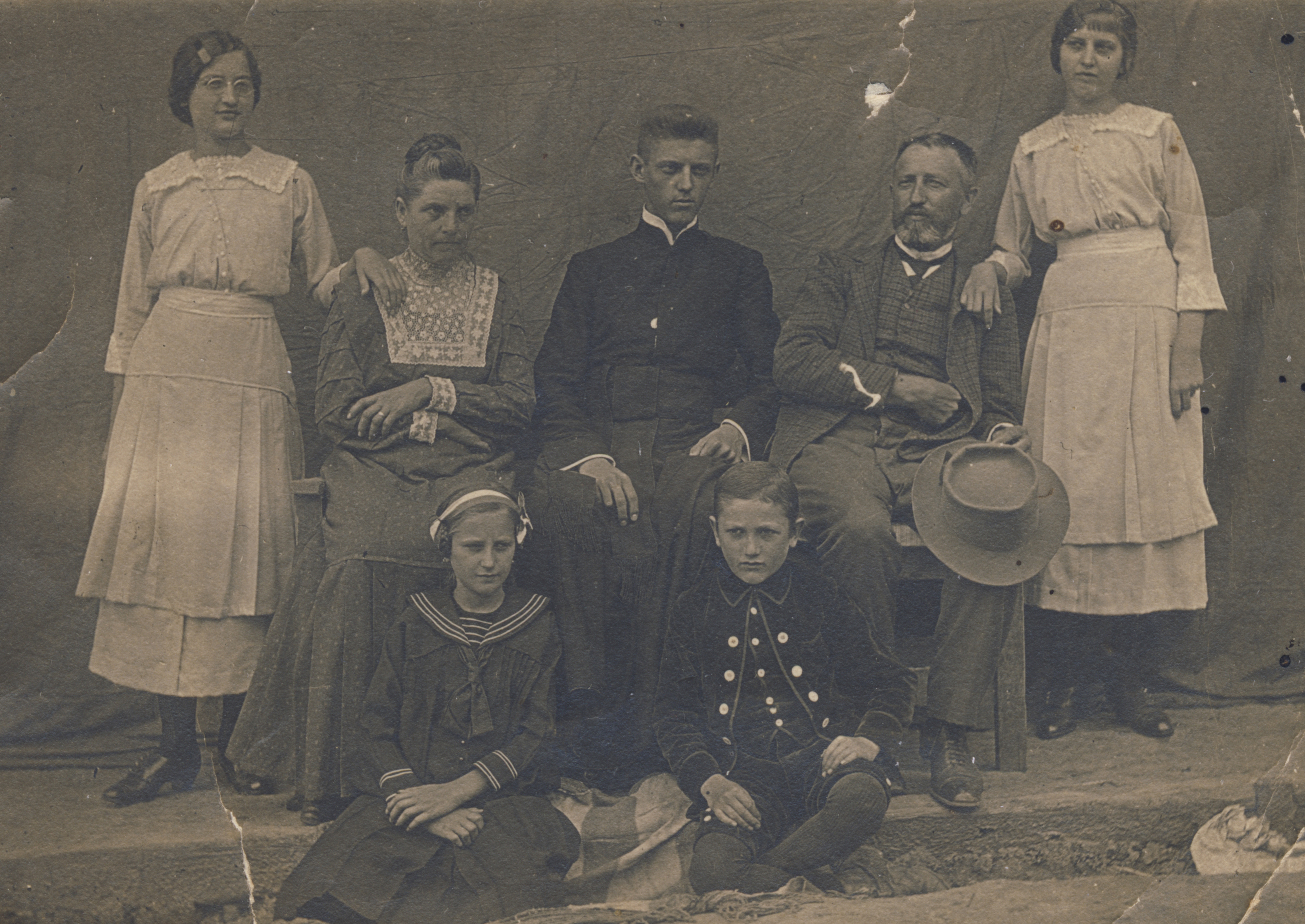 Agárdy család 1920 előtt